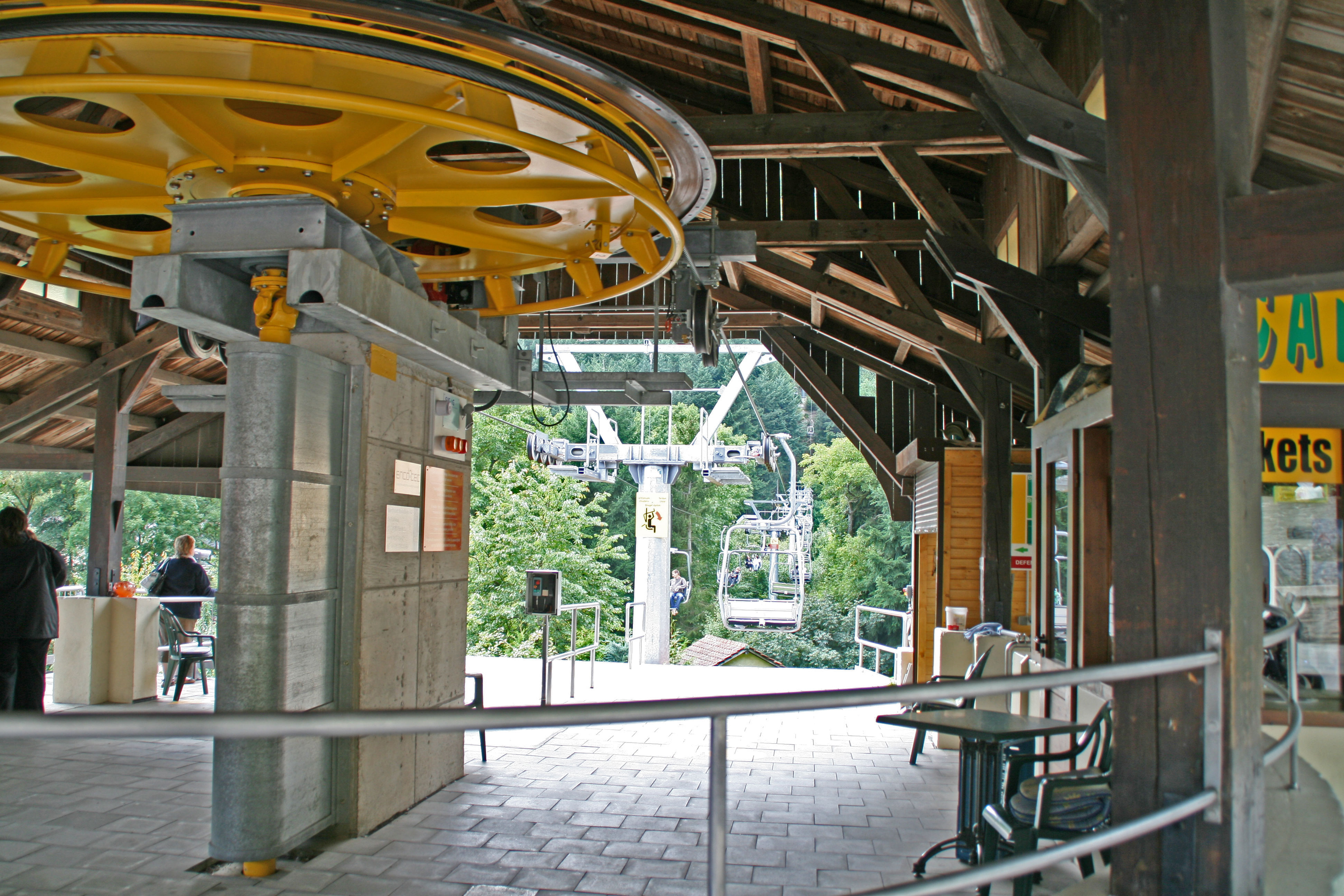 Veianer Sëtzlift Buedemstatioun.